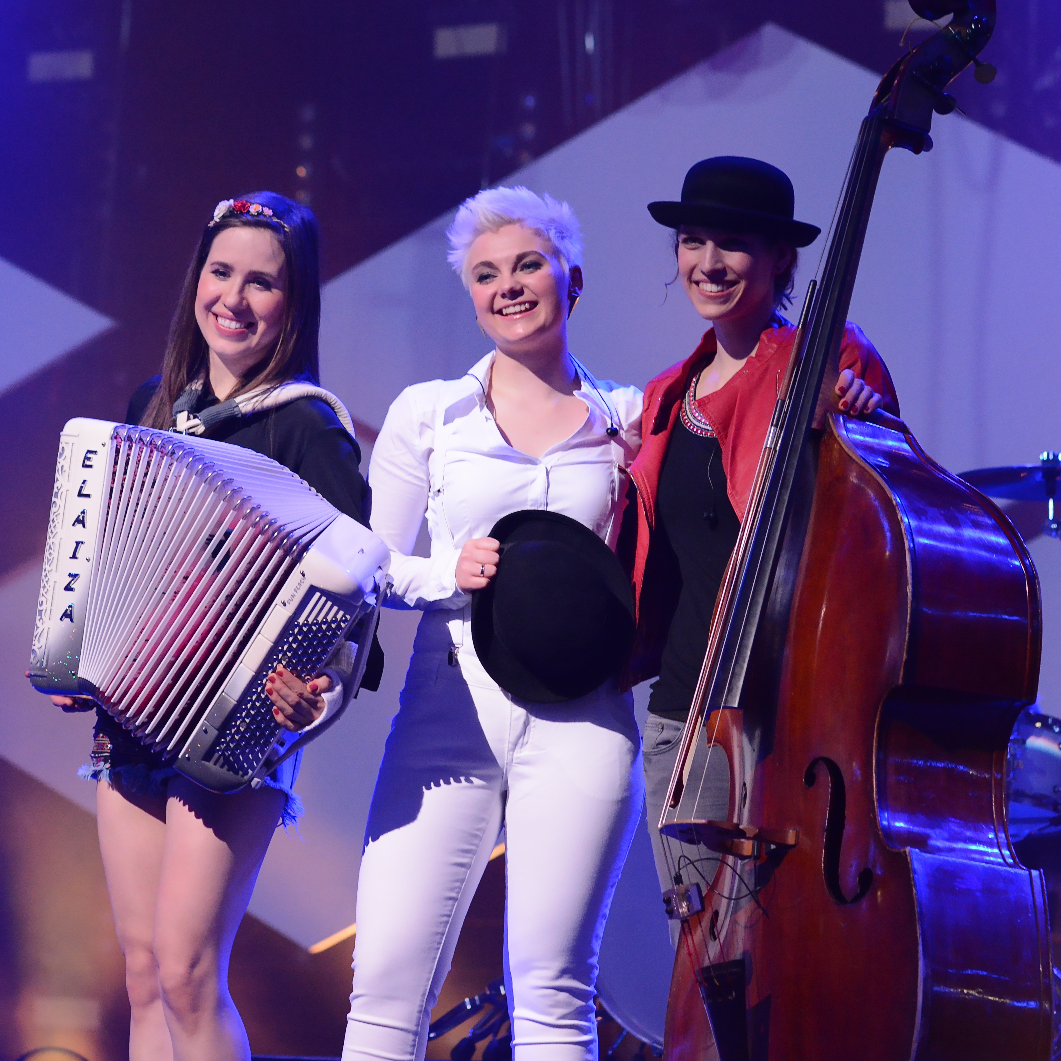 Elaiza bei Unser Song für Dänemark 2014 in Köln.